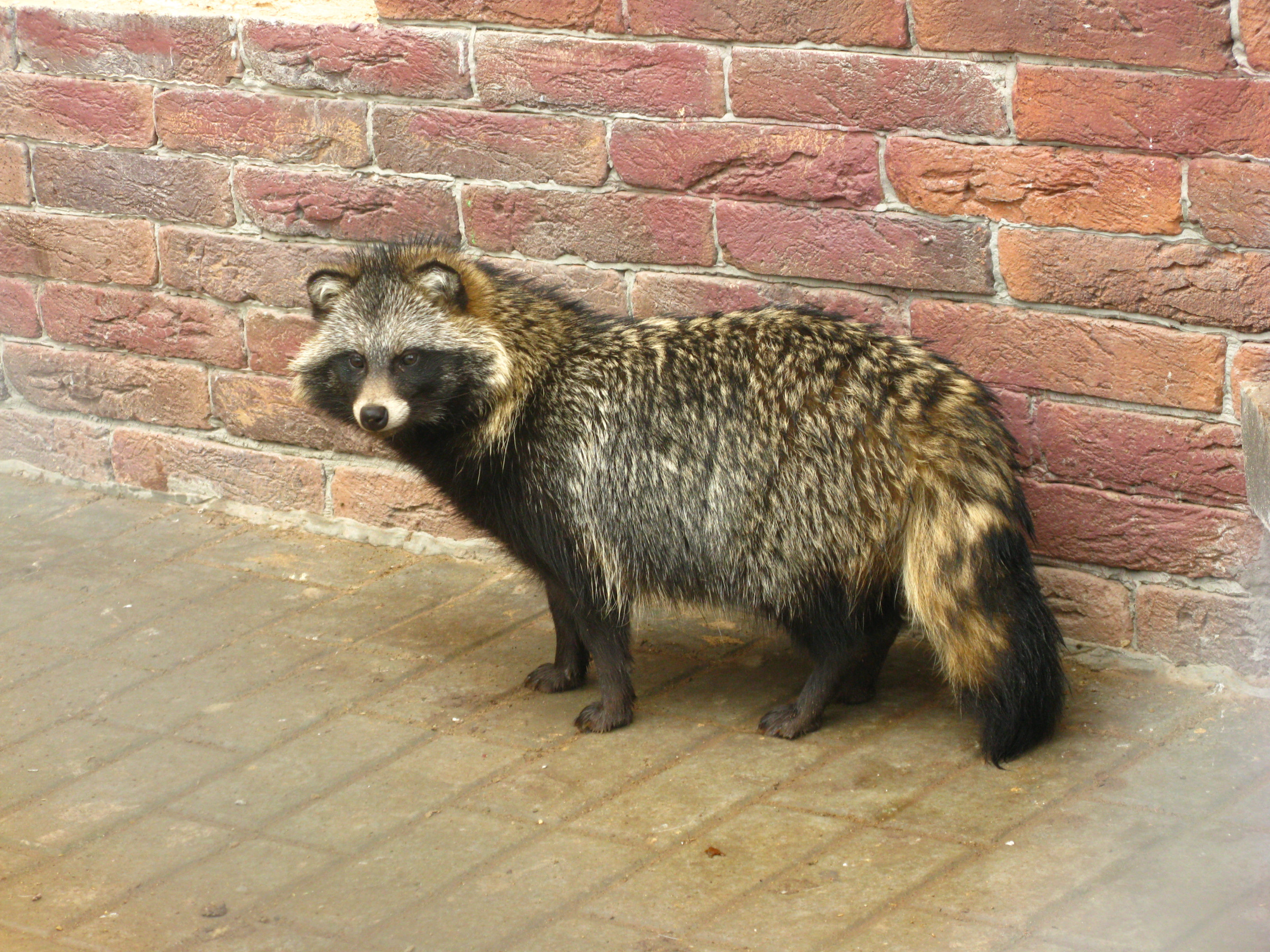 Енотовидная собака (Nyctereutes procyonoides) в зоопарке города Гродно, Беларусь.